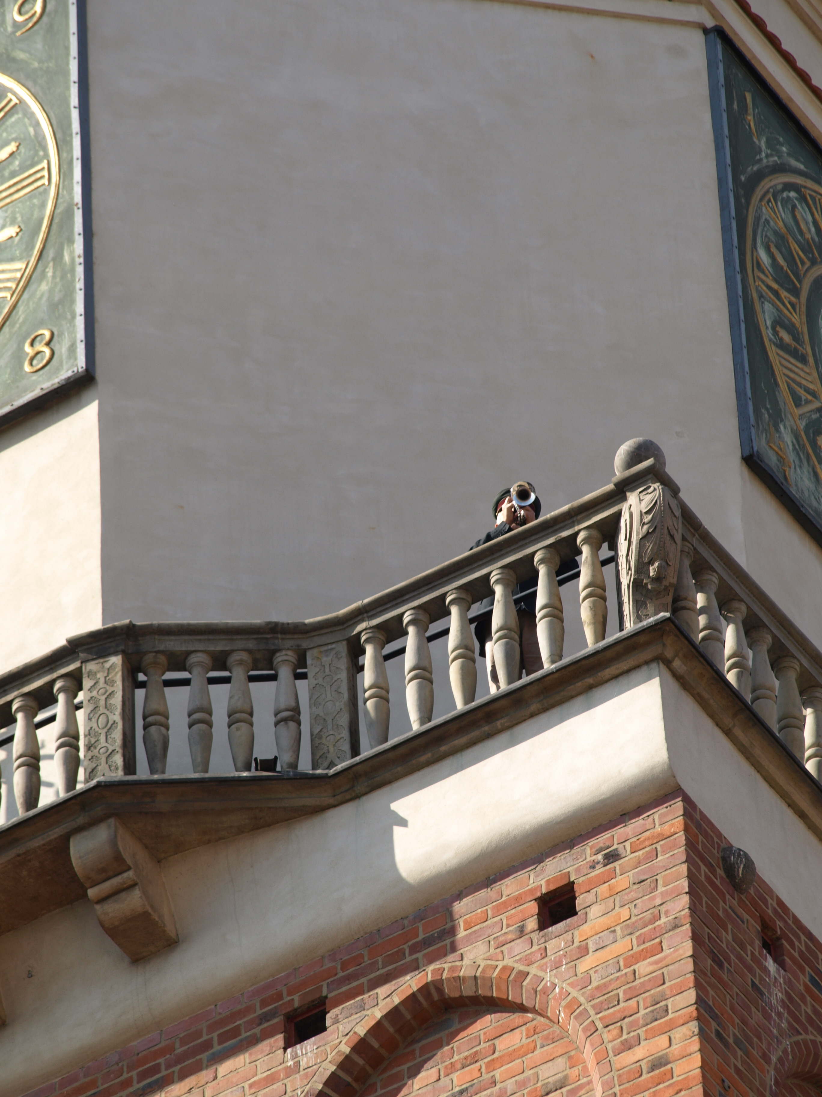 City hall in Poznań